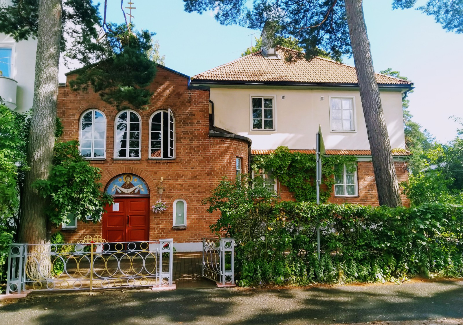 Pokrovan seurakunnan kirkko Helsingin Munkkiniemessä.